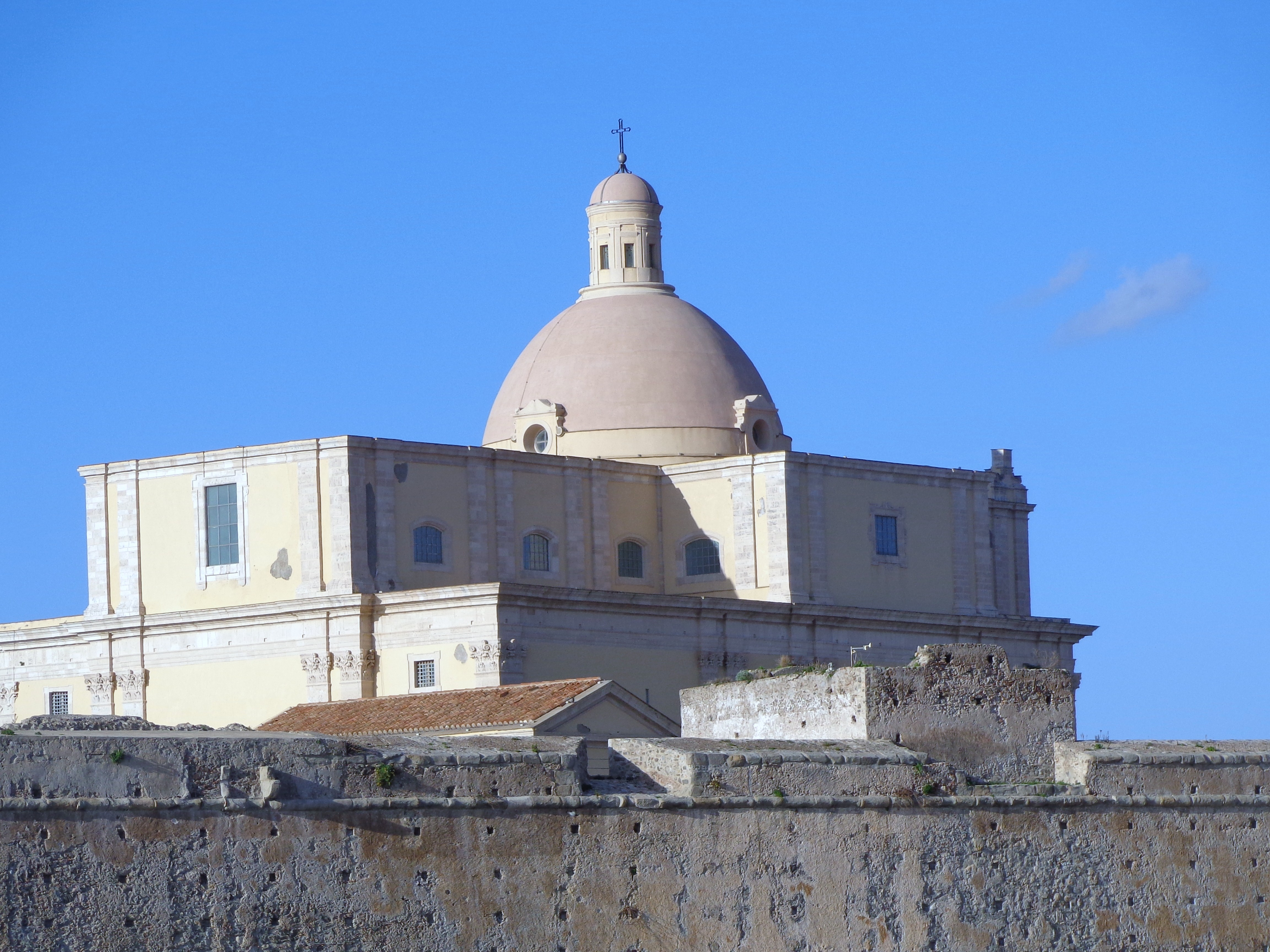 Duomo